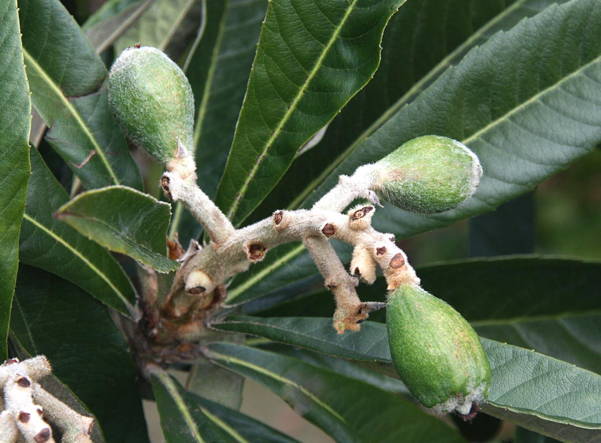 Eclaississage néflier du Japon